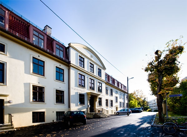 Bjørknes høyskole fasade